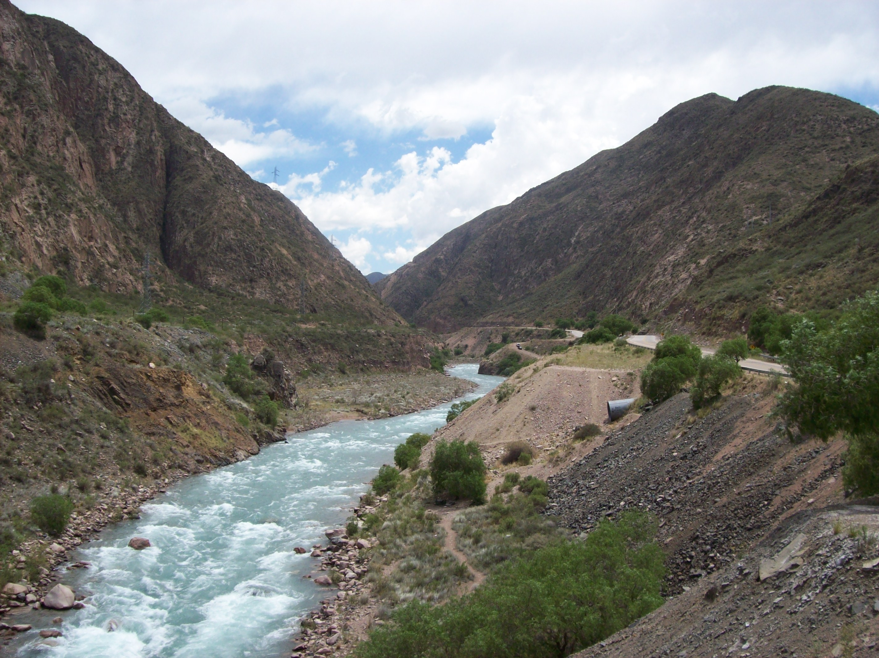 Río Mendoza y Ruta Provincial 82 junto a la cabecera occidental del túnel clausurado, en el Departamento Las Heras, Provincia de Mendoza, Argentina.